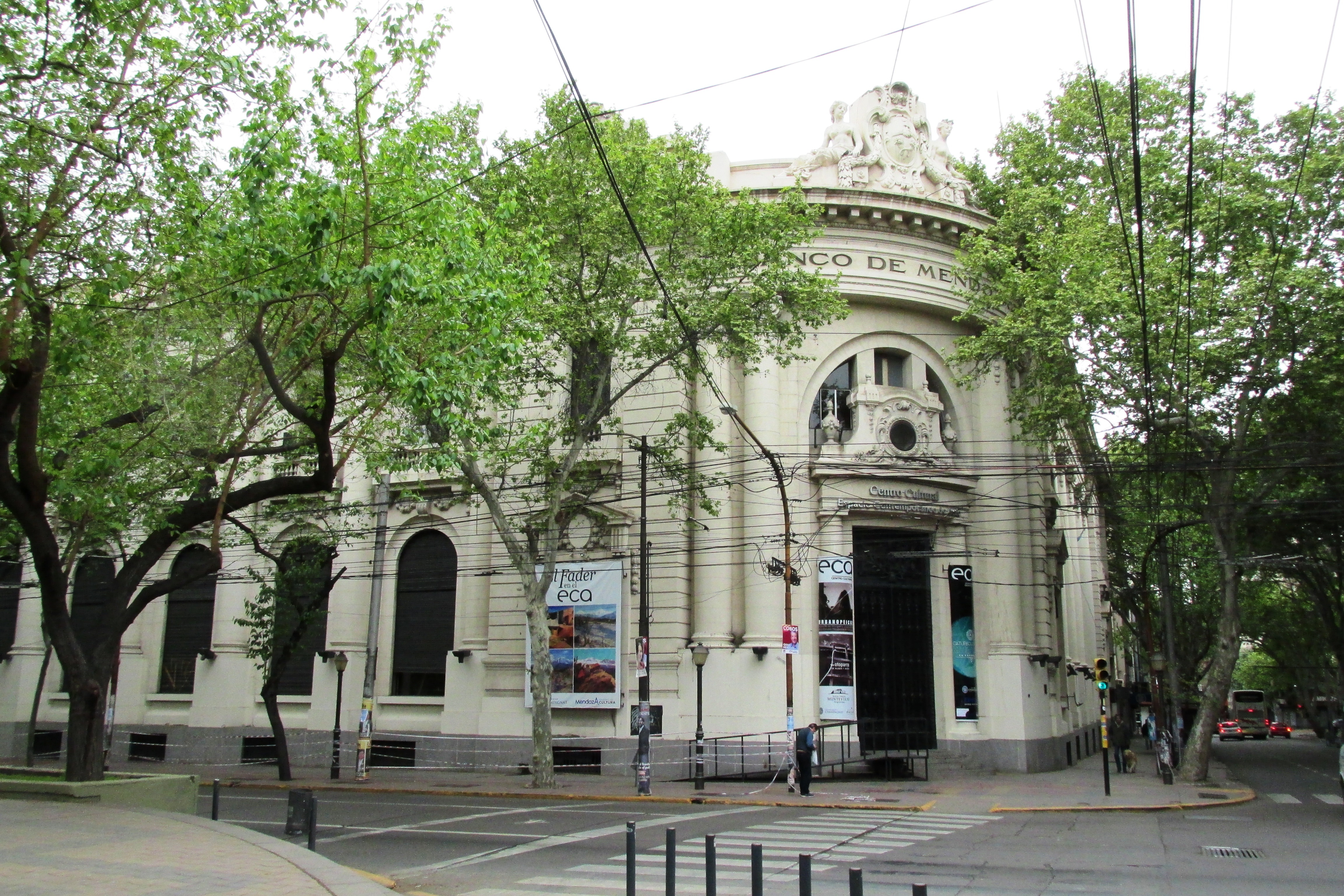 Vista Frontal de Centro Cultural Espacio Contemporáneo de Arte, Ex-Banco Mendoza, en ciudad de Mendoza Argentina